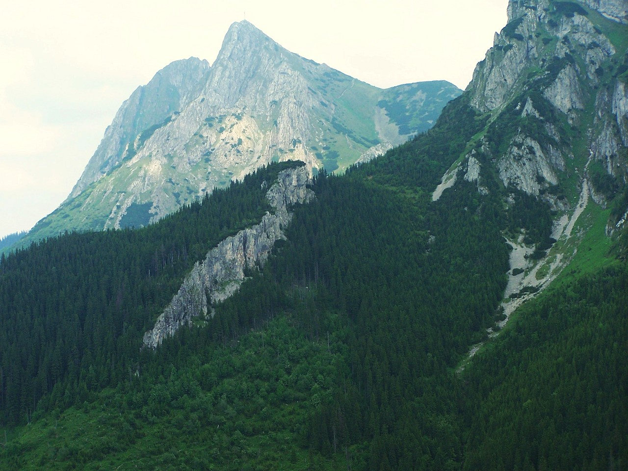 U góry Giewont, poniżej Miętusi Skoruśniak,a w nim Niedźwiedź i Siwarowa Przełęcz, po jej prawej stronie Zagonna Turnia